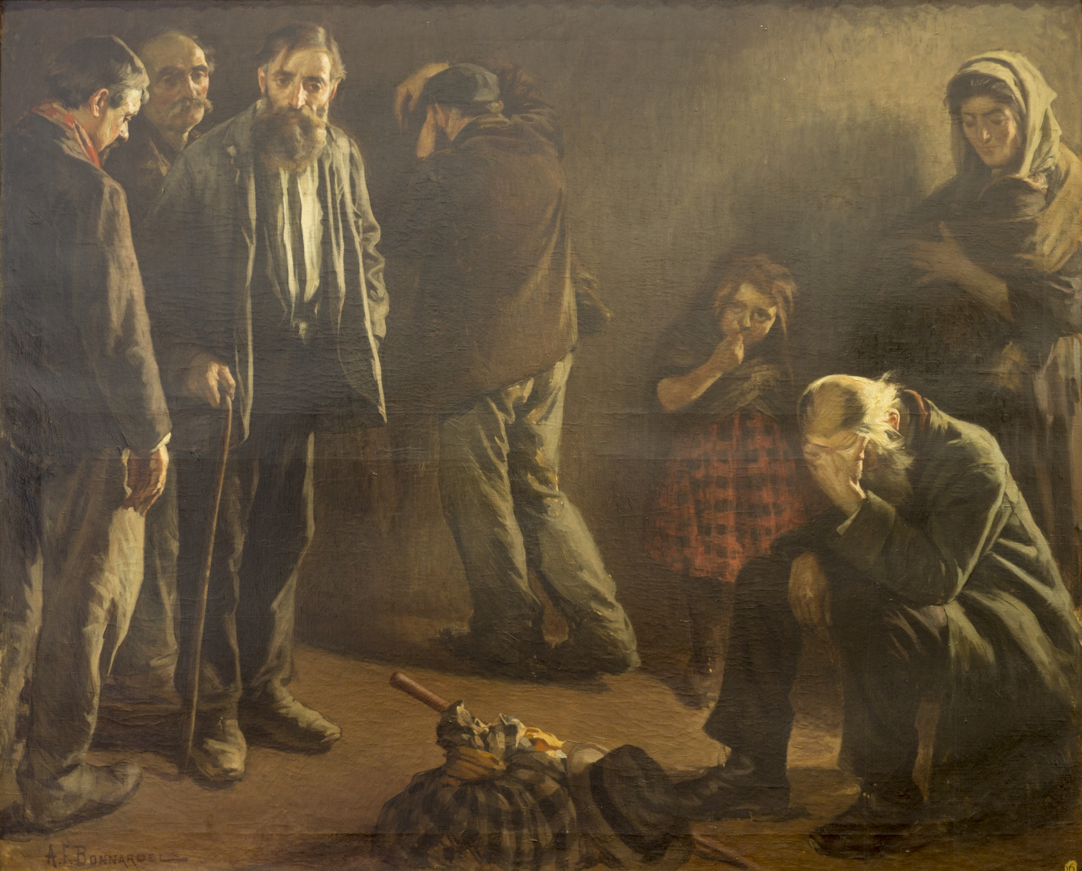 Les Exilés